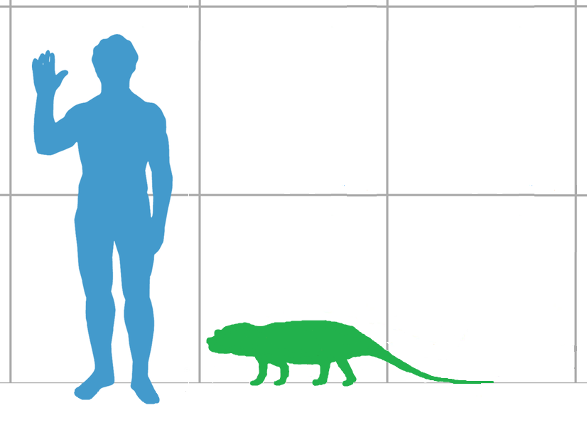 size comparison of tetraceratops